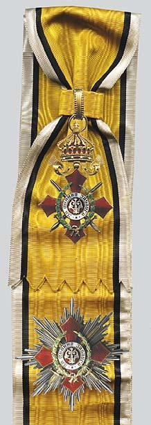 Орден_„За_Военна_Заслуга“_I_ст.